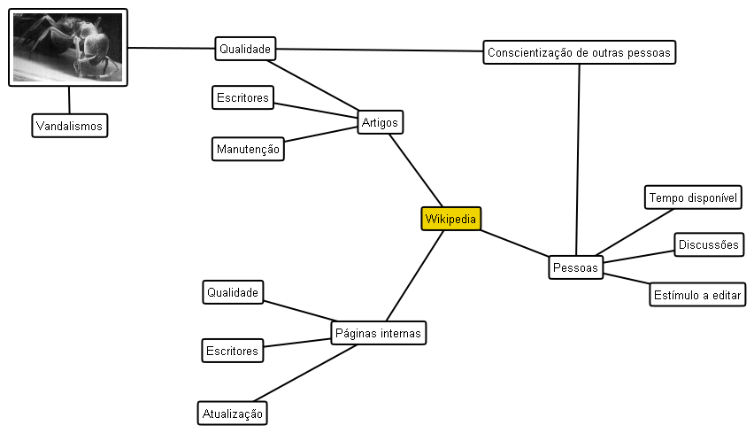 Mapa mental da Wikipedia para o artigo "mapa mental"